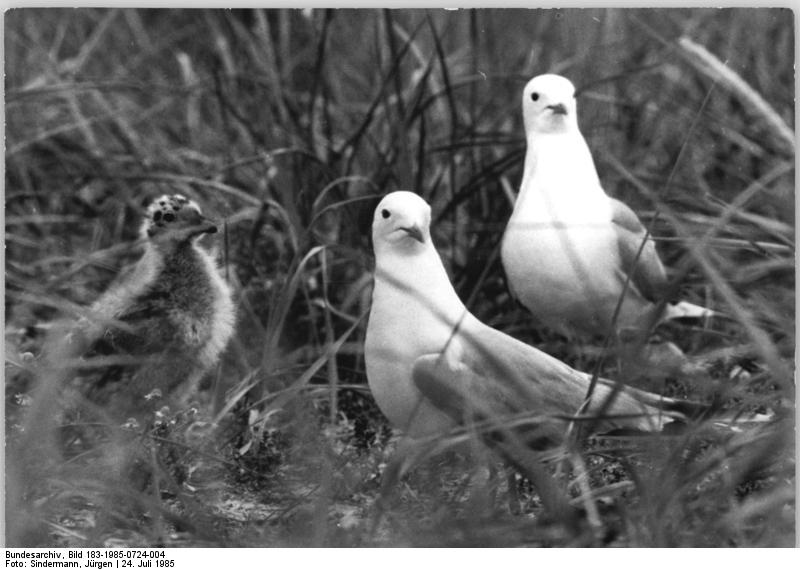 Langenwerder, Seevögel ADN-ZB Sindermann 24.7.85 Bez. Rostock: Vogelschutz- In der Sturmmöwenkolonie der Naturschutzinsel Langenwerder bewachen die Elterntiere streng ihren Nachwuchs und sind bereit, ihn gegen jeden Fremdling zu verteidigen. Das Seevogelschutzgebiet, das rund 20 Hektar groß ist und zwischen Salzhaff und Ostsee bei der Insel Poel liegt, beherbergt die größte Sturmmöwen- und Küstenseeschwalbenkolonie der DDR. Außerdem ist die Insel Brutplatz für weitere seltene Seevogelarten sowie wichtiges Rast- und Durchzugsgebiet für Strand- und Wasservögel. (siehe 2 und 3 N)